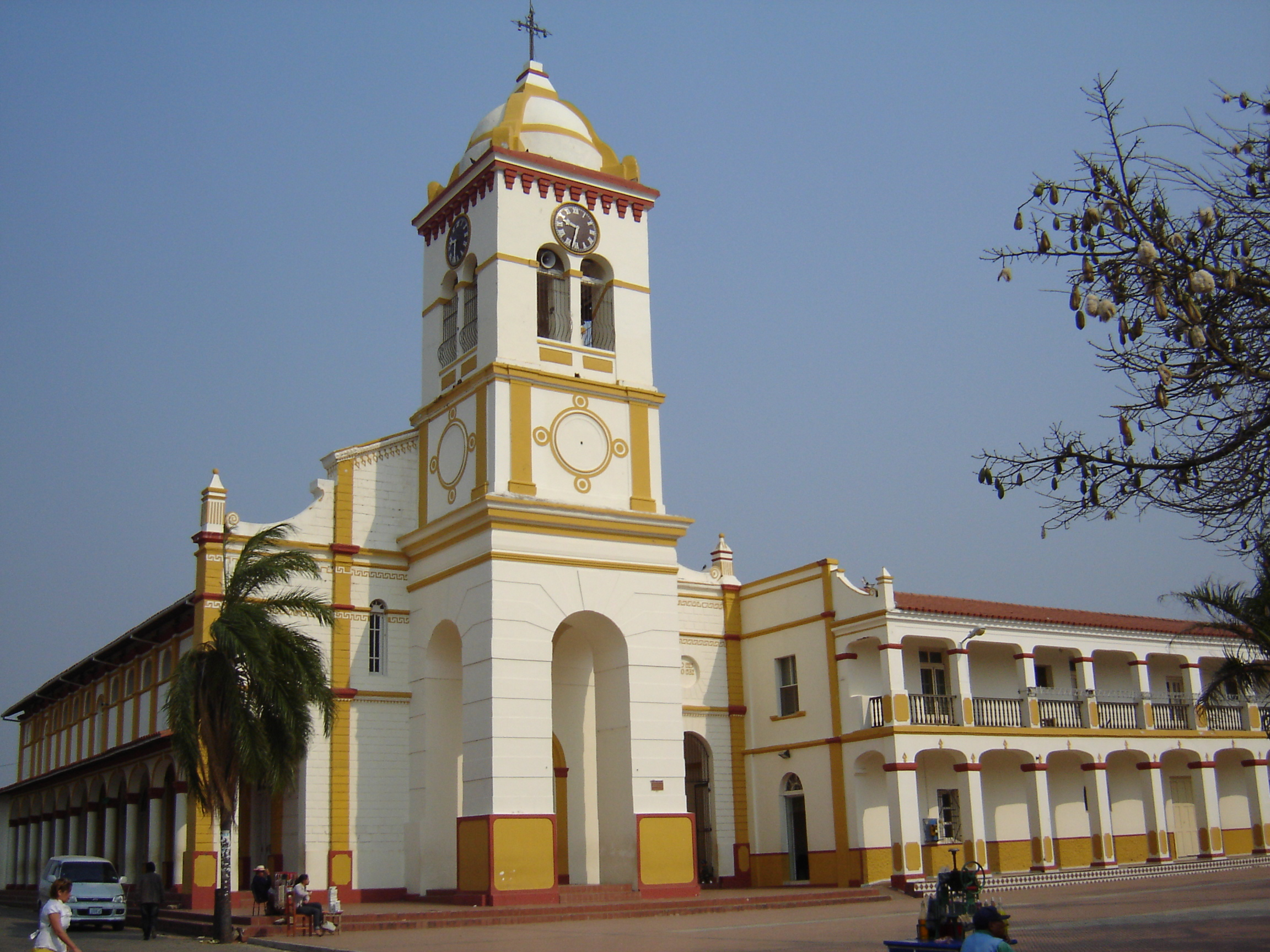 Runa Simi: Qutukamanta Llump'aq Mariyaq wak'an, Santa Krus, Wuliwya suyupi.